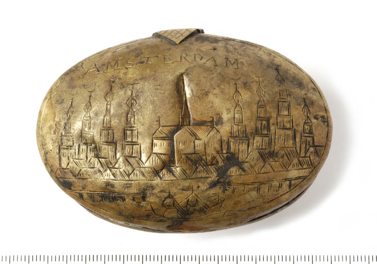 Zeventiende-eeuwse tabaksdoos met gezicht op de stad. Gevonden bij archeologische opgravingen tijdens de bouw van de Noord/Zuidlijn in Amsterdam. Found at archeological site in Amsterdam (Netherlands), while building the Noord/Zuidlijn.